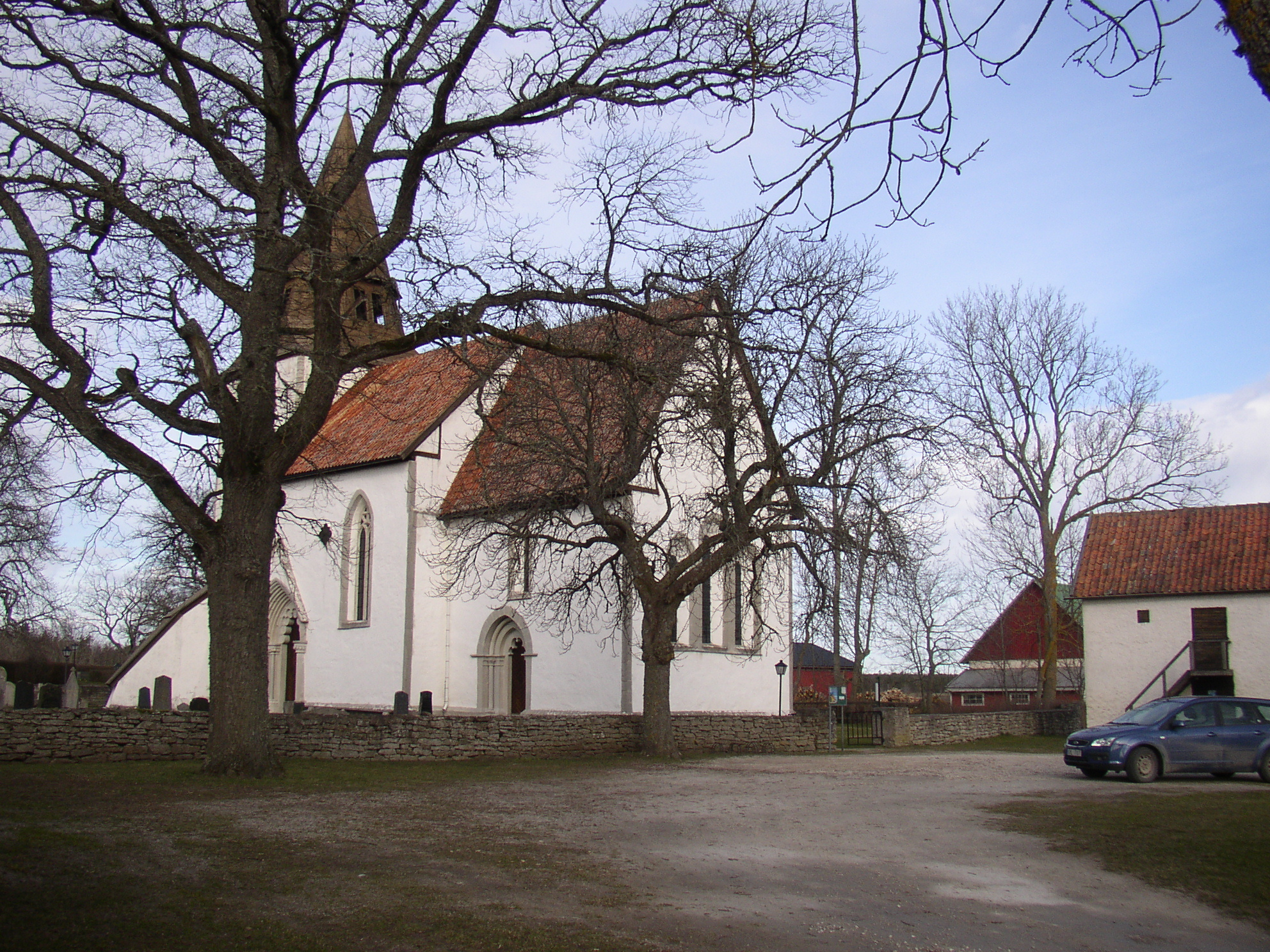 Kerk van Boge Rindert 07:32, 7 April 2007 (UTC)